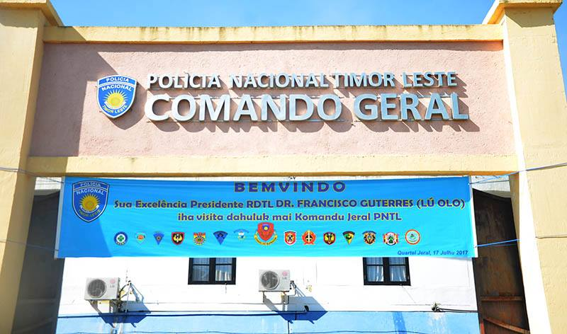 Generalkommando der Nationalpolizei Osttimors